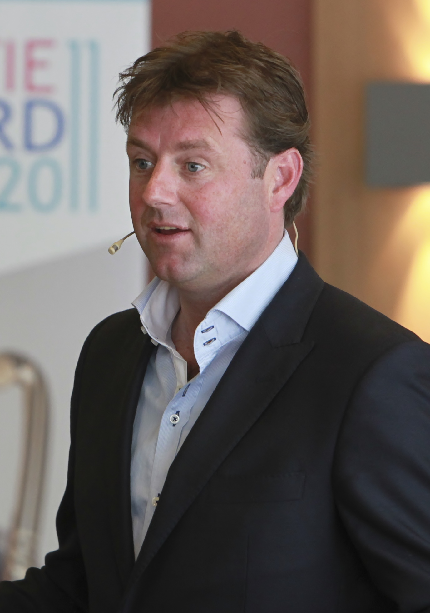 Marc Lammers tijdens de Week van de Ondernemer op 12 april 2011.